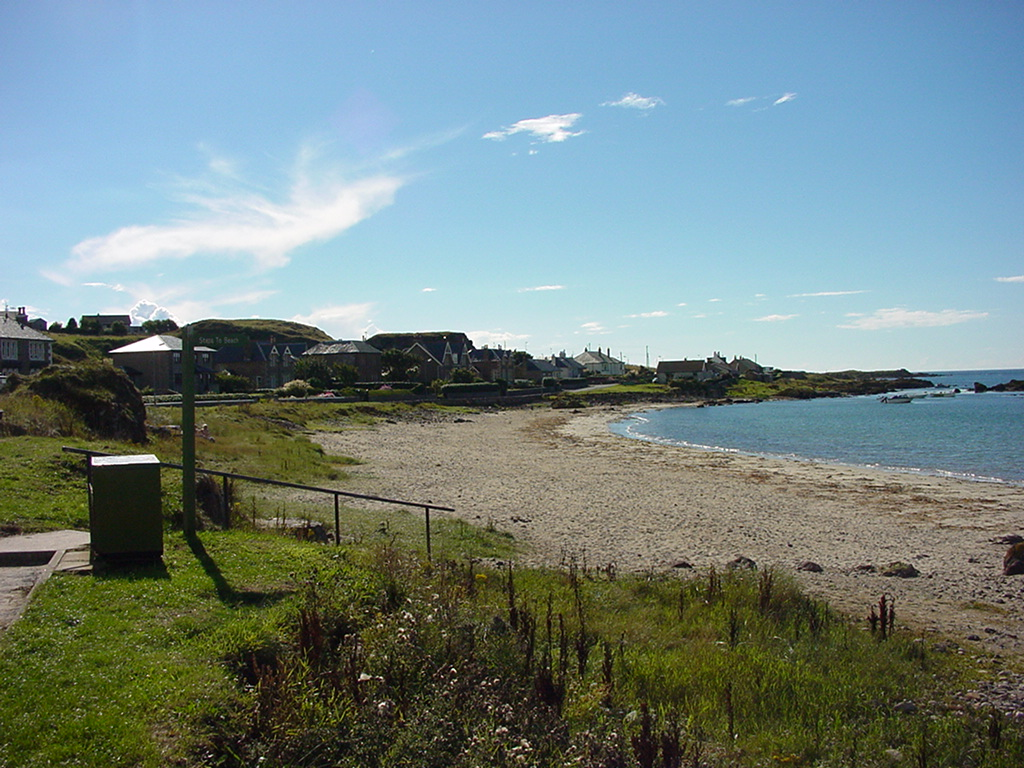 Machrihanish Bay